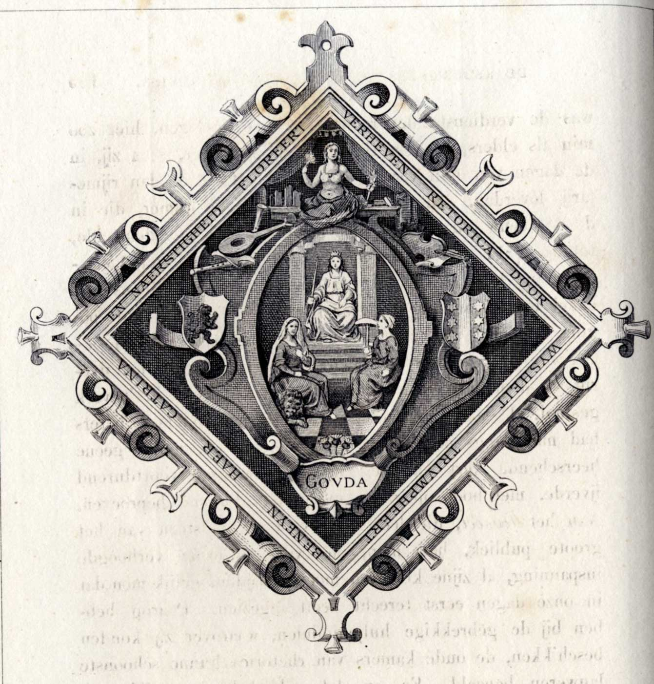 Blazoen van de Rederijkerskamer de Goudsbloem van Gouda- litografie door Piet Schipperus (1840-1929)